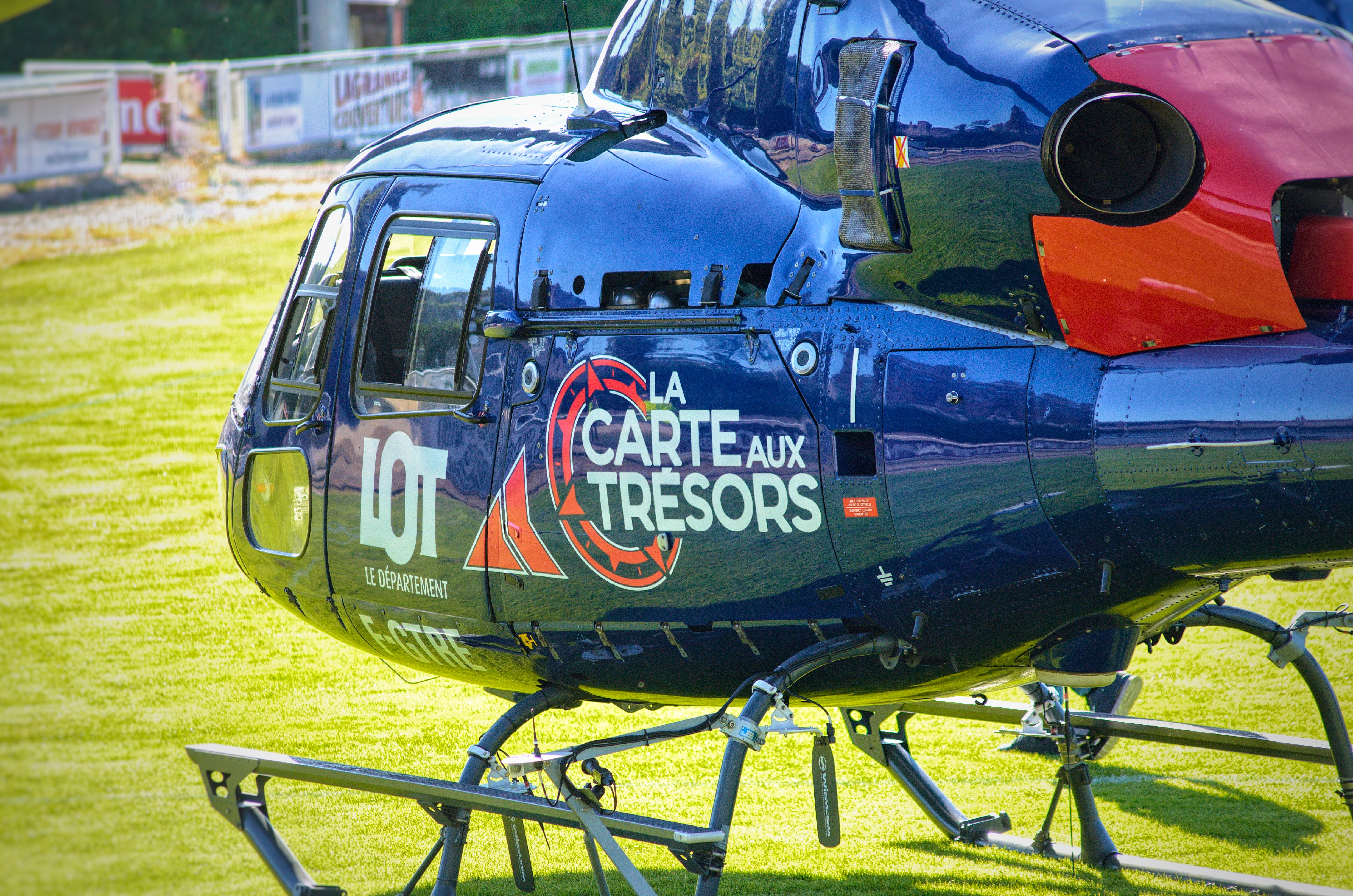 L’hélicoptère de l’équipe rouge, posé sur la pelouse du stade du Calvaire à Figeac, le 27 septembre 2018, lors de l’enregistrement de l’émission dans le département du Lot.